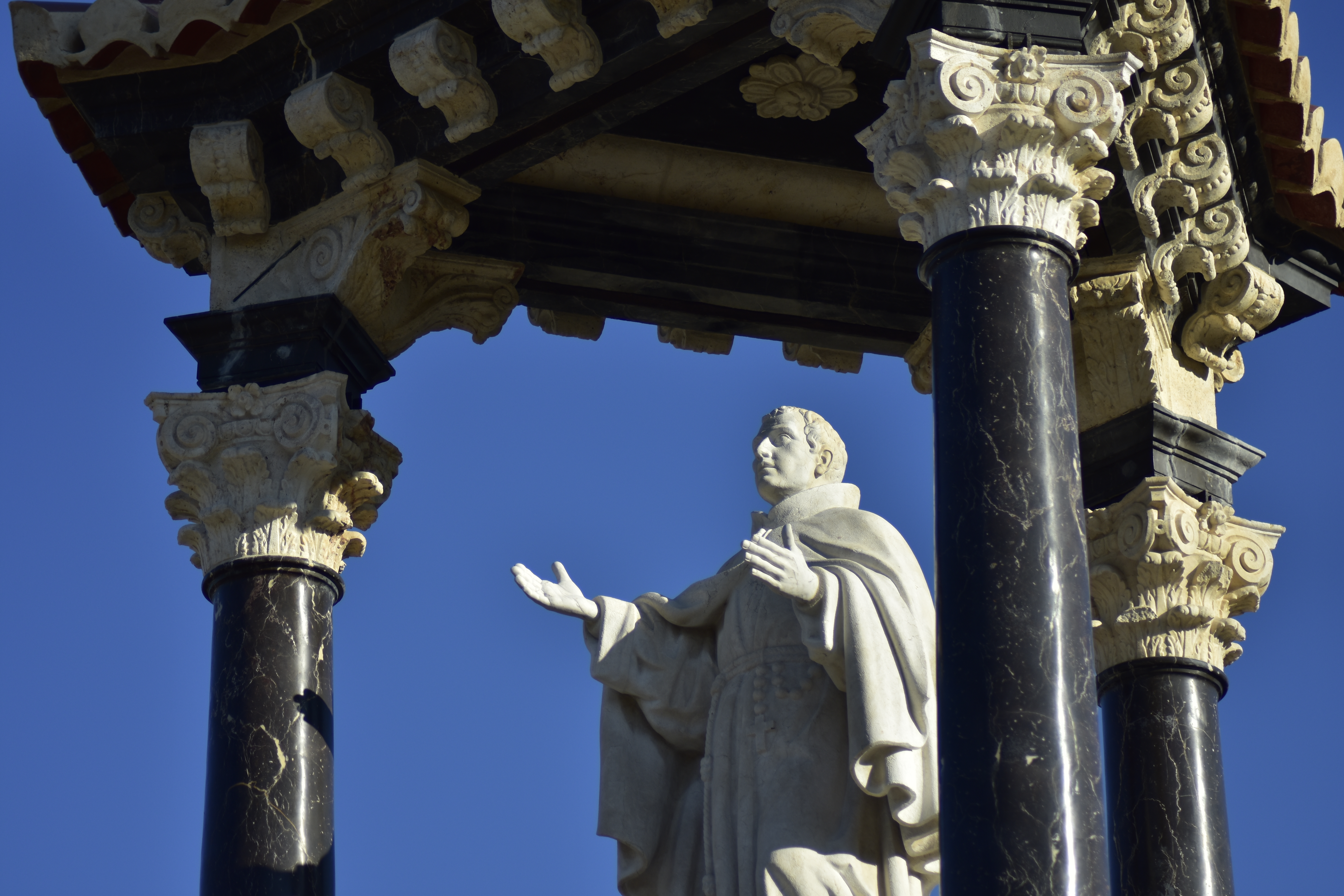 Templet de Sant Pasqual Bailón al Pont de la Mar de València després de la neteja acabada en setembre de 2016.